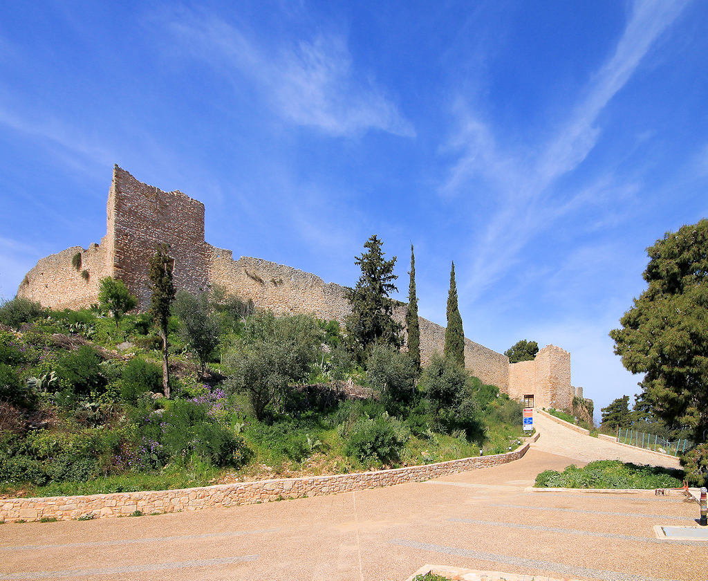 Κάστρο Βόνιτσας